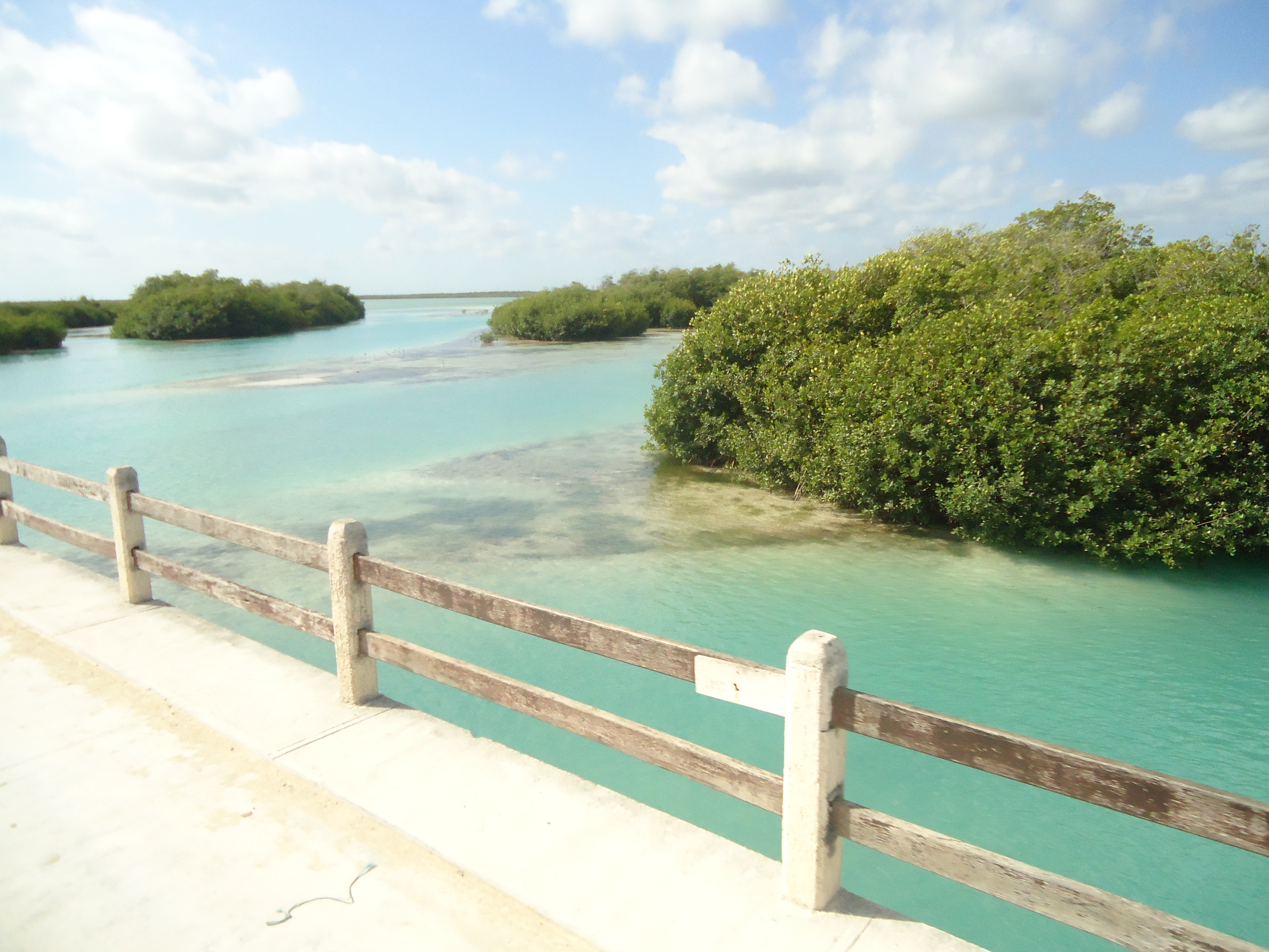 Manglars a la reserva de la biosfera de Sian Ka'an, a l'estat mexicà de Quintana Roo.